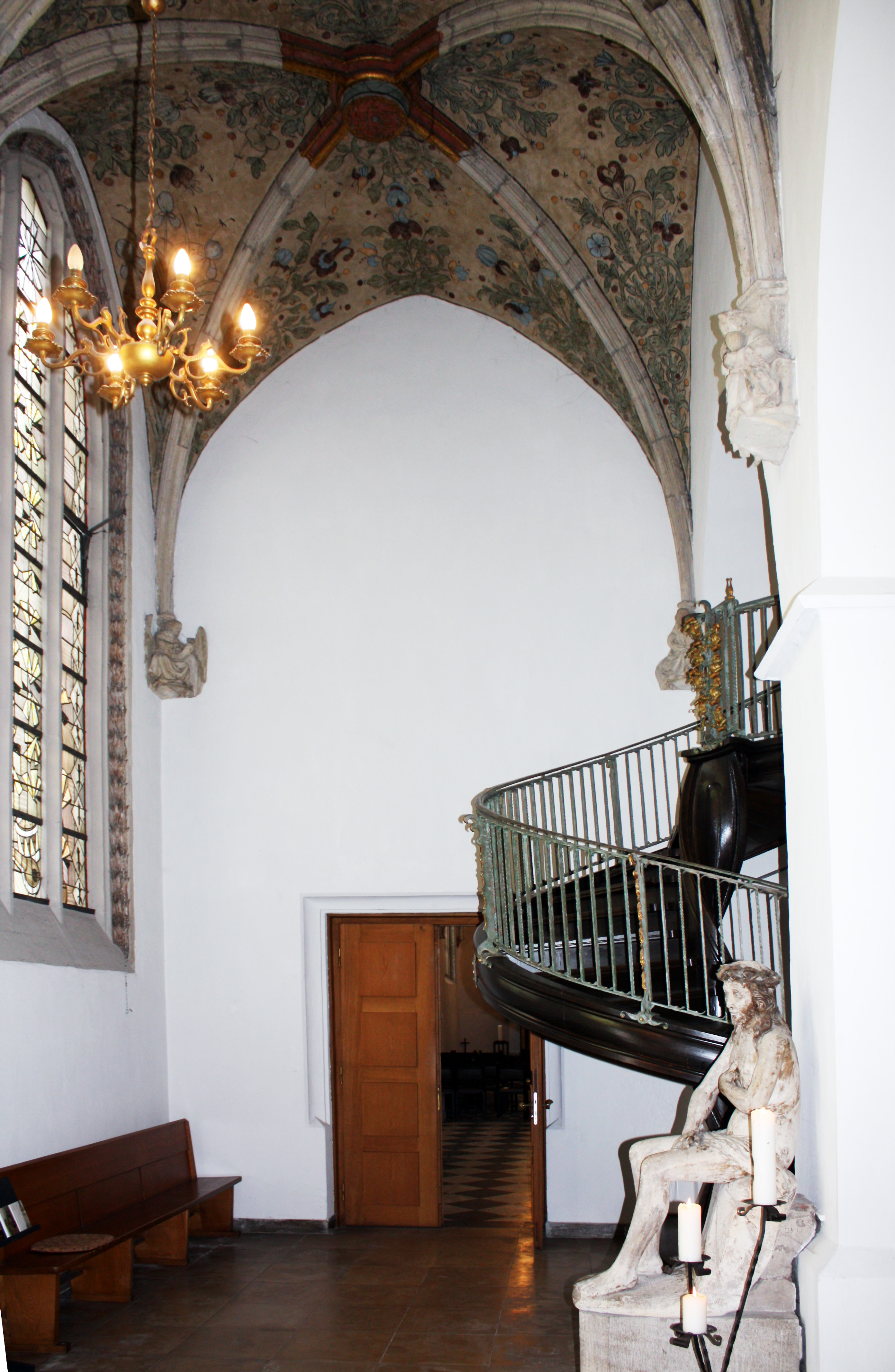 Kölner Kartause, Engelskapelle der Ev. Kartäuserkirche